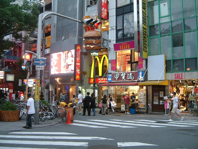 America-mura, Osaka.